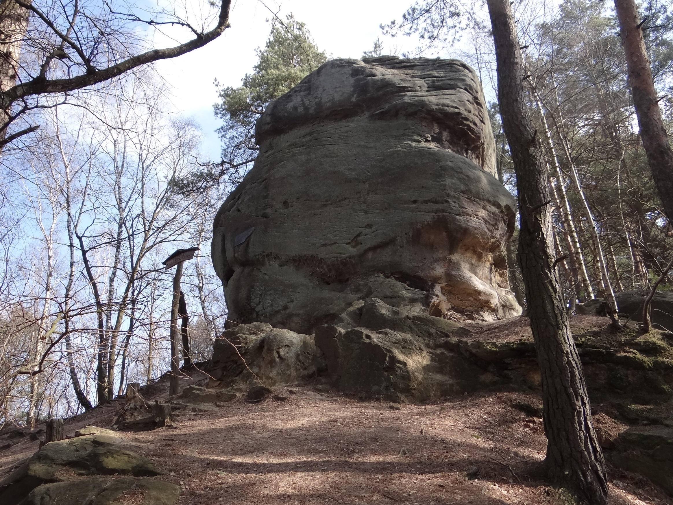 Baszta J. I. Paderewskiego w Skamieniałym Mieście w Ciężkowicach